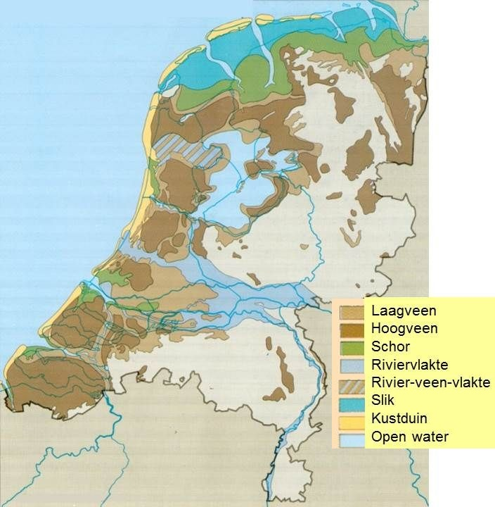 Kaart van Nederlandse bodems na 100 n.Chr.